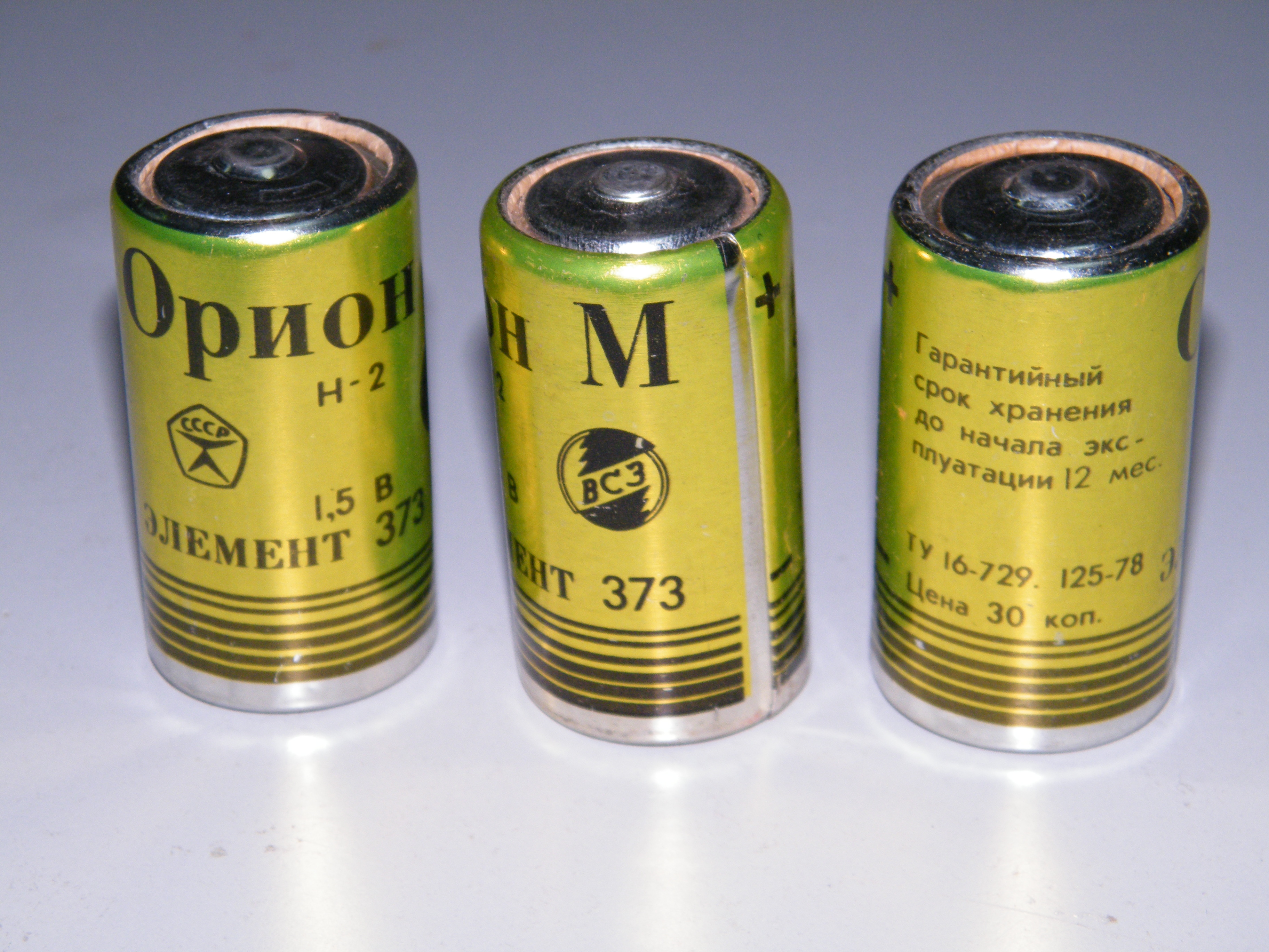 Теплый ламповый звук